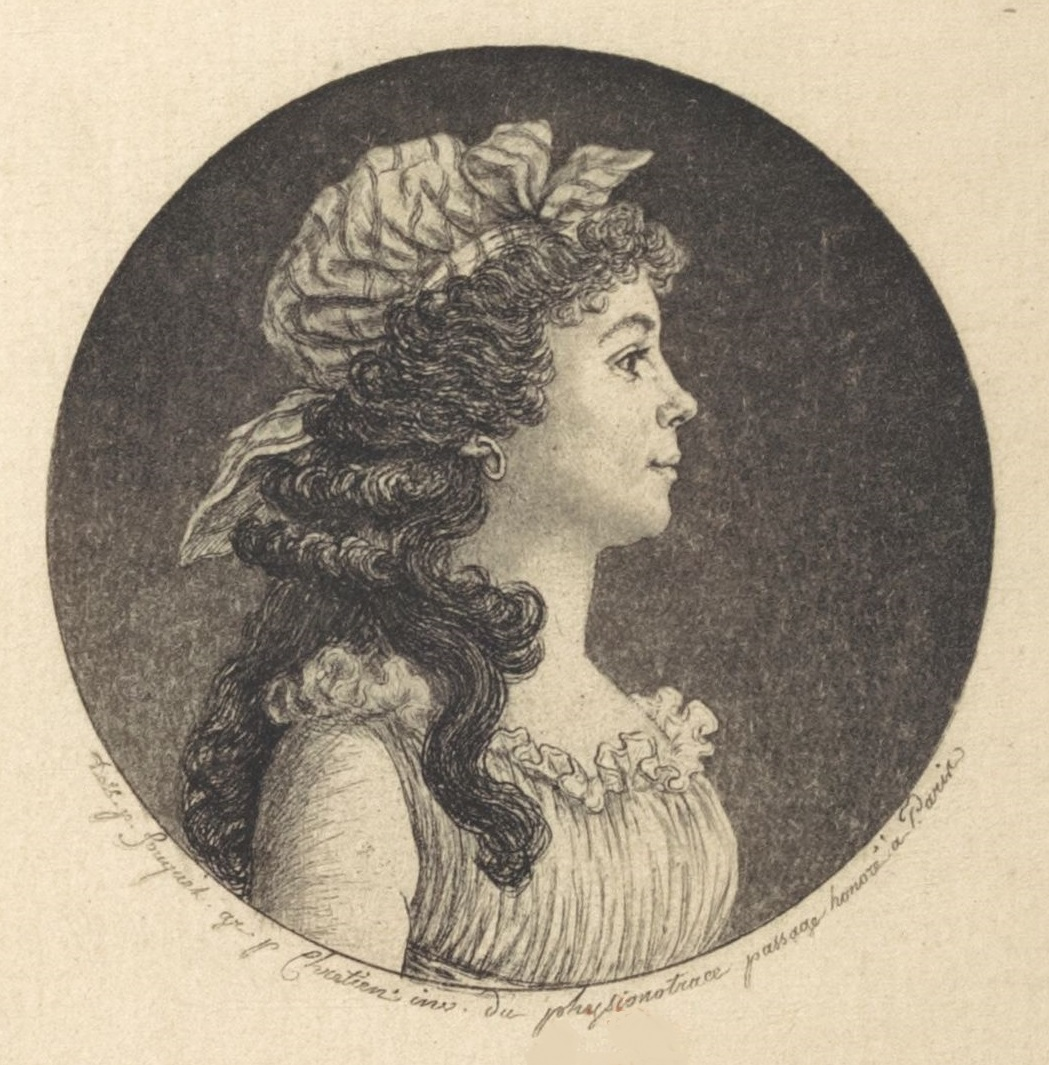 Portrait dessiné par Jean Fouquet et gravé par Gilles-Louis Chrétien, inventeur du physionotrace.